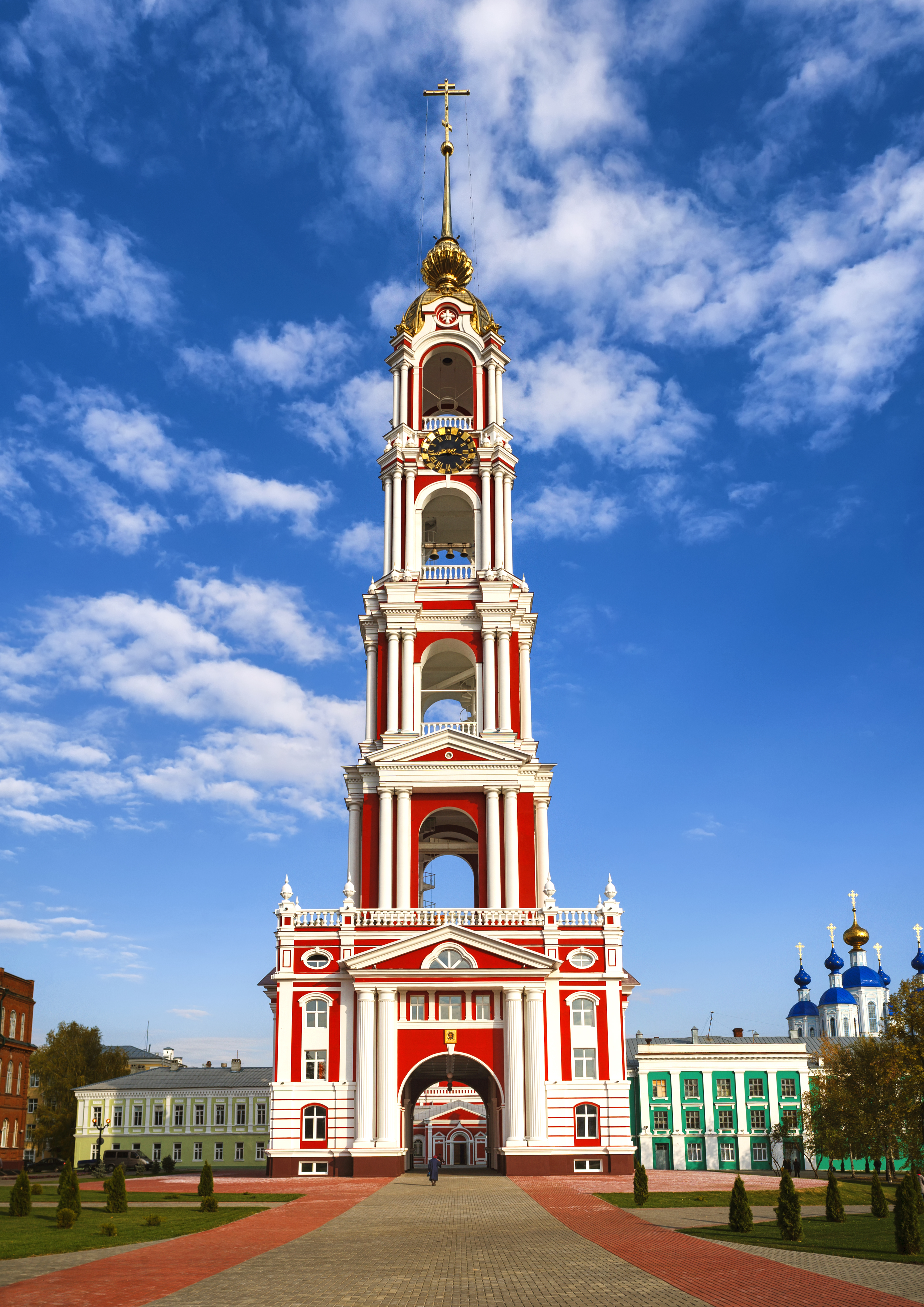 Монастырь Казанский, колокольня (2009-2014) (Тамбовская область, Тамбов, Максима Горького улица, 2, 2а, 2б, 3)